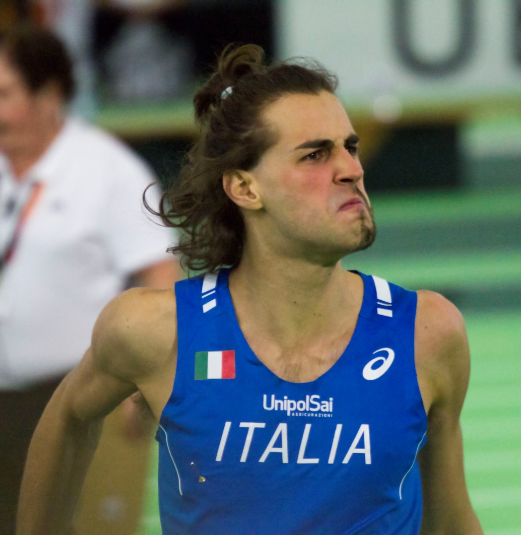 568 tamberi